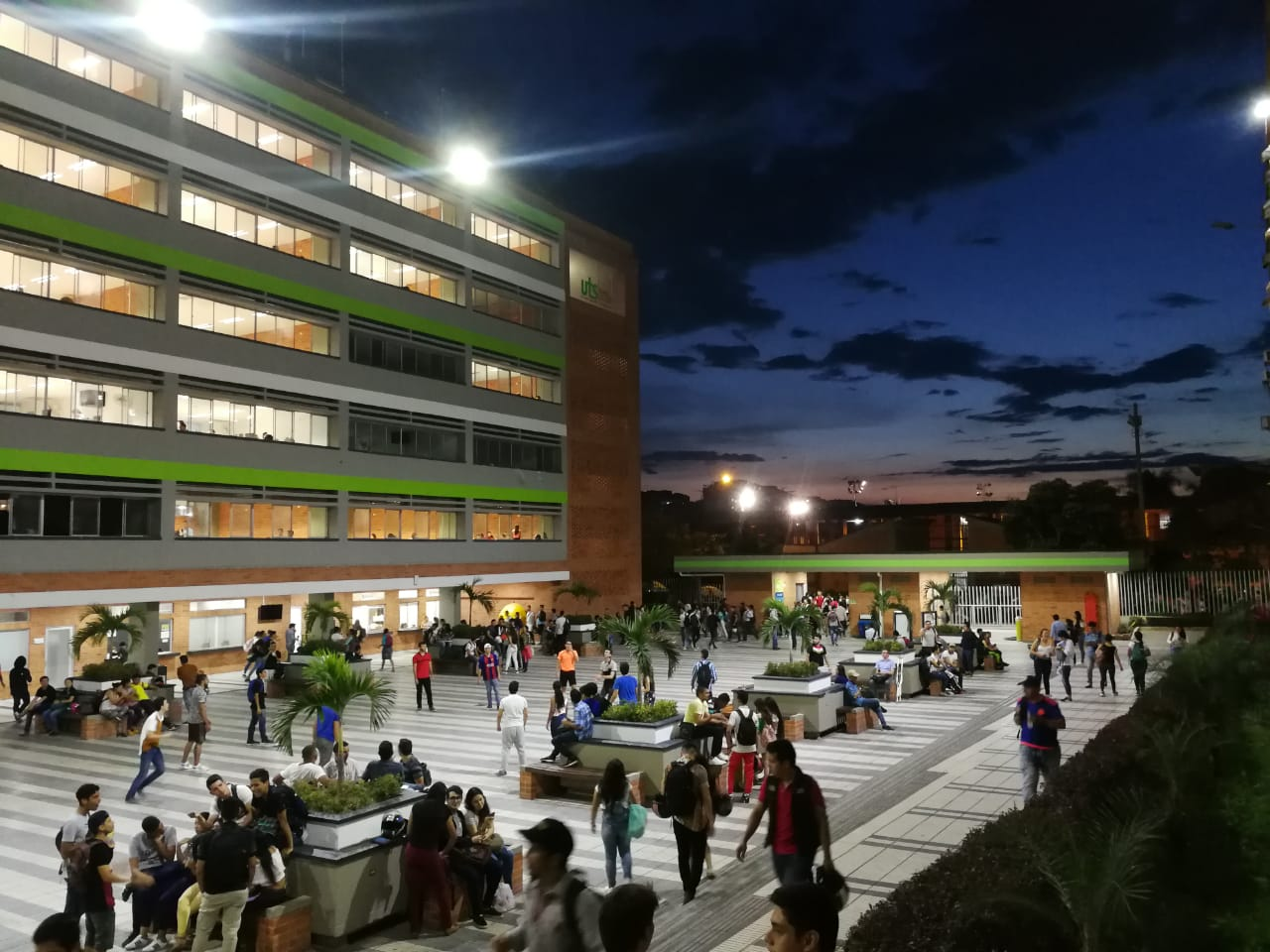 Foto tomada Estudiante Uteísta